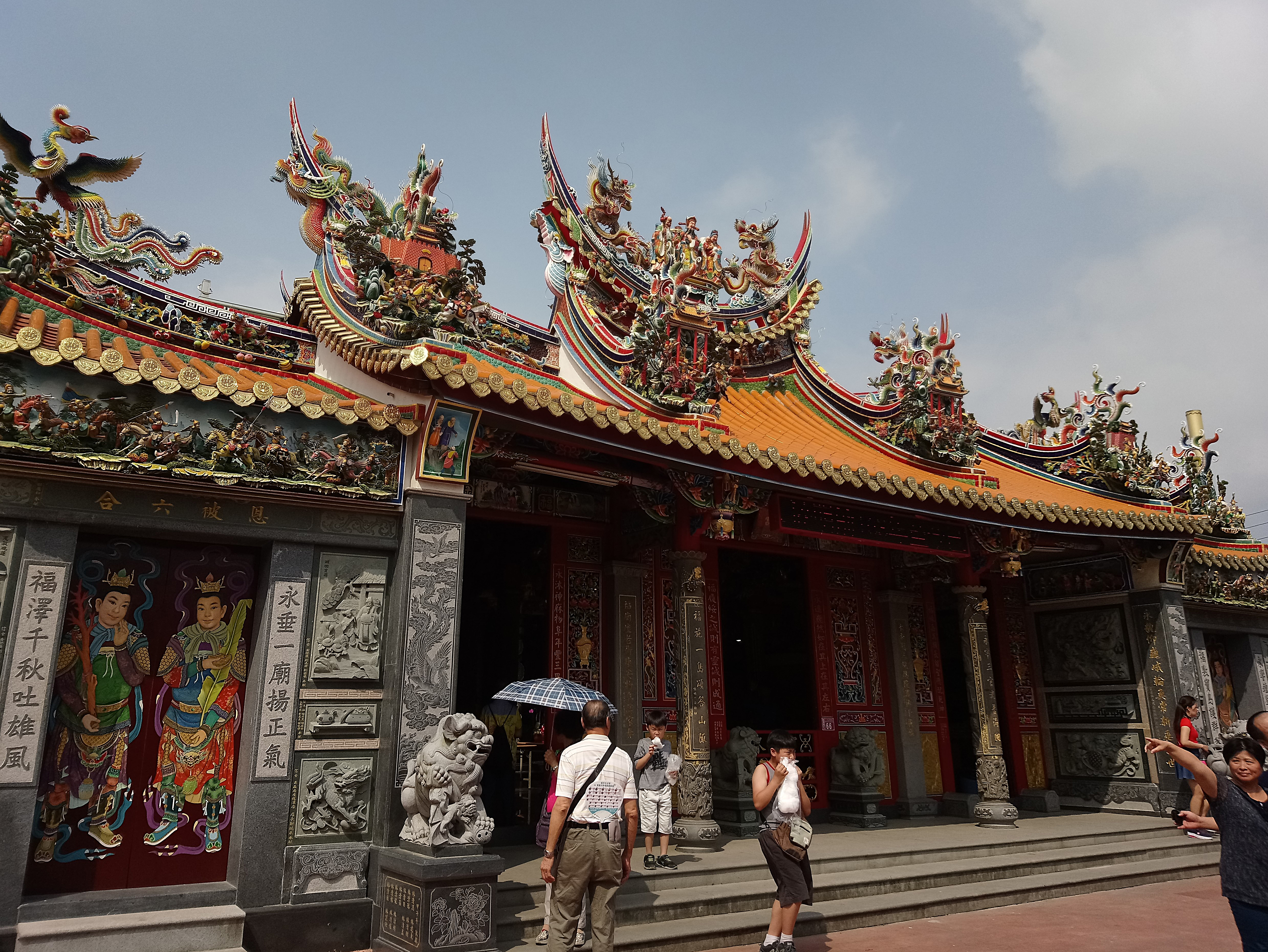 三坑子永福宮,桃園市龍潭區三坑里